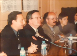 Josep Ferrer Bujons (el penúltim de l'esquerra) a la Veu de l'Anoia